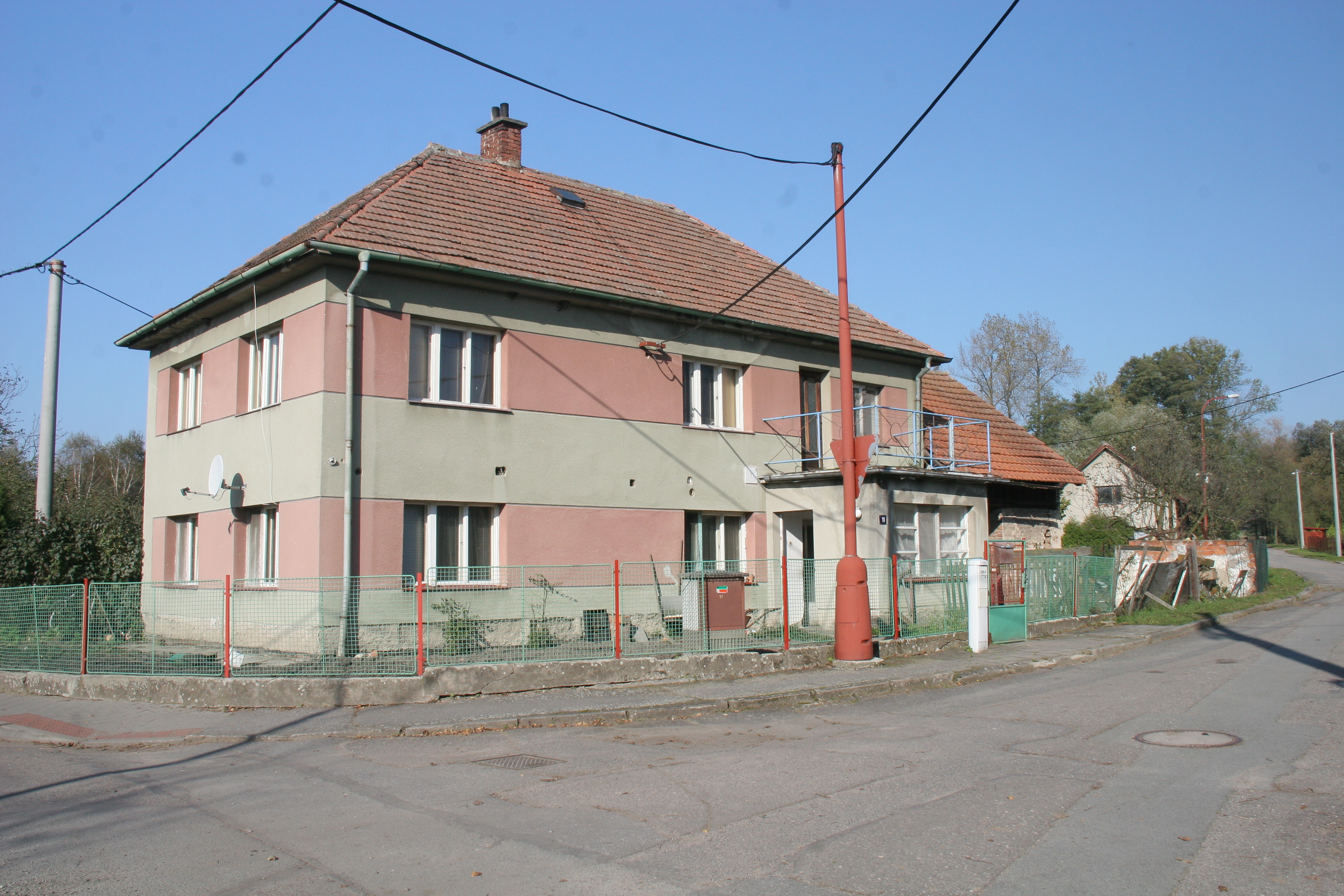 Rzy čp. 11